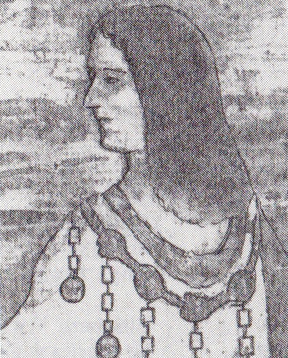 Heinrich der Milde, Herzog von Braunschweig-Lüneburg (gest. 1416)